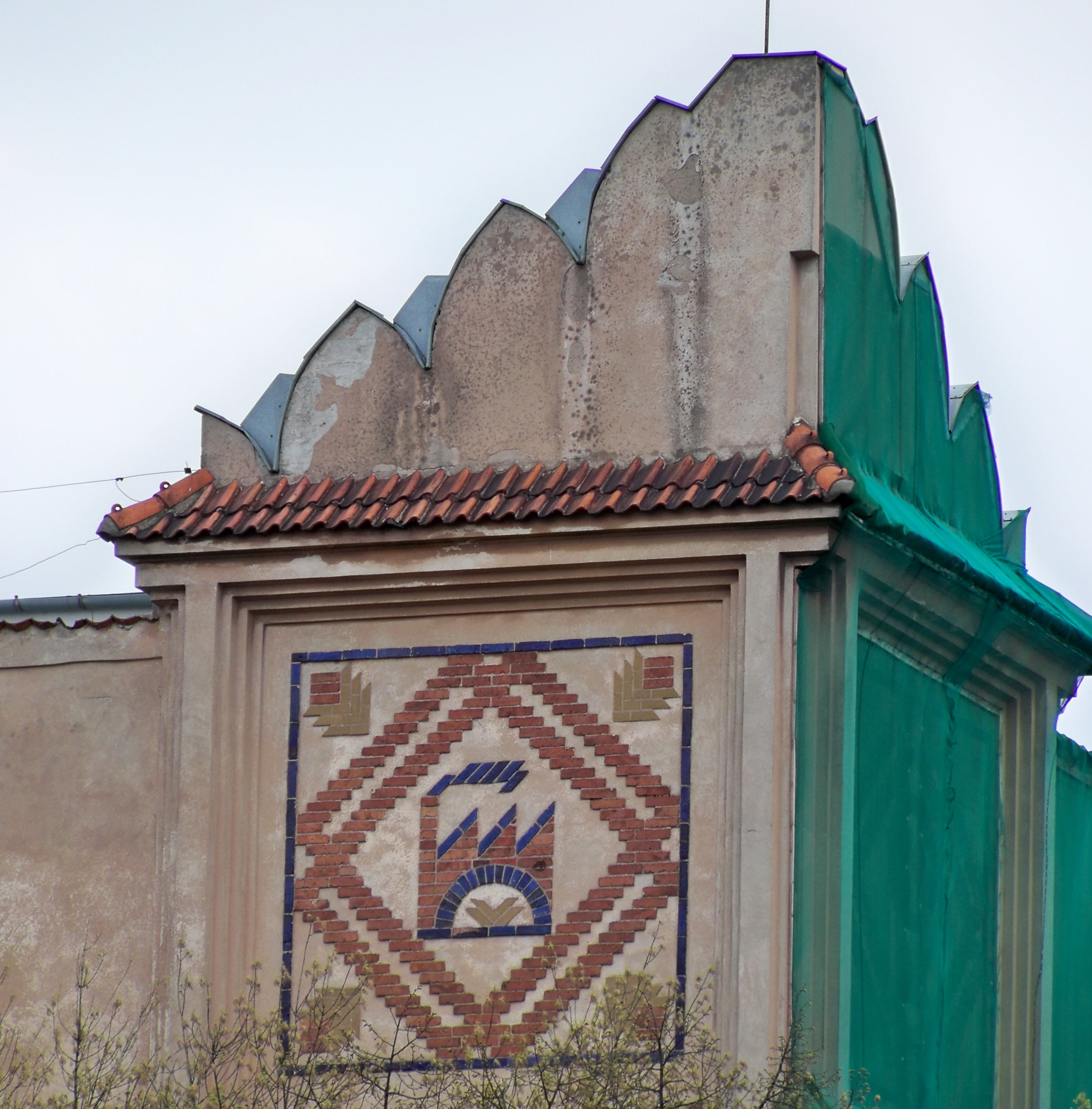 Szkoła Główna Handlowa w Warszawie. Budynek A (ul. Rakowiecka 24). Mozaika.